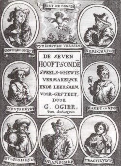 Titelblad van de verzameldruk van Ogiers kluchten uit 1682: "De seven Hooft-sonden, speels-ghewijs, vermakelyck ende leersaem voor-gestelt", uitgegeven in Antwerpen en Amsterdam